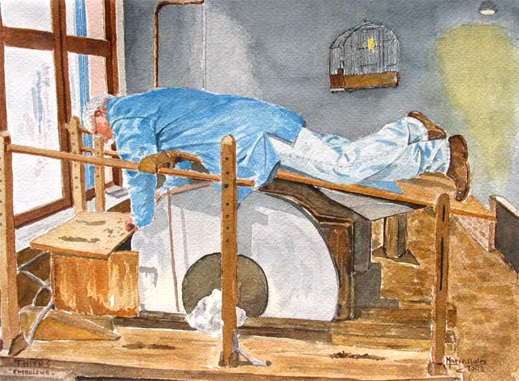 L'émouleur - Thiers (France).